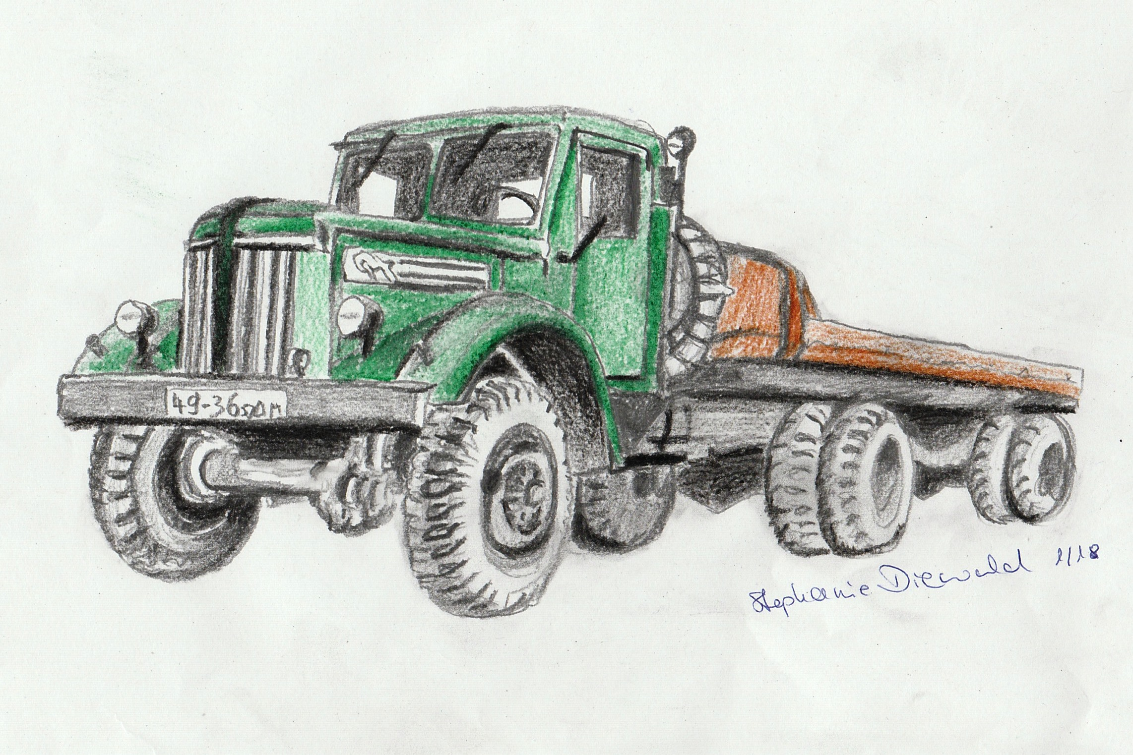 MAZ-501W, die Allradvariante des MAZ-200, hier die Ausführung als Sattelzugmaschine.